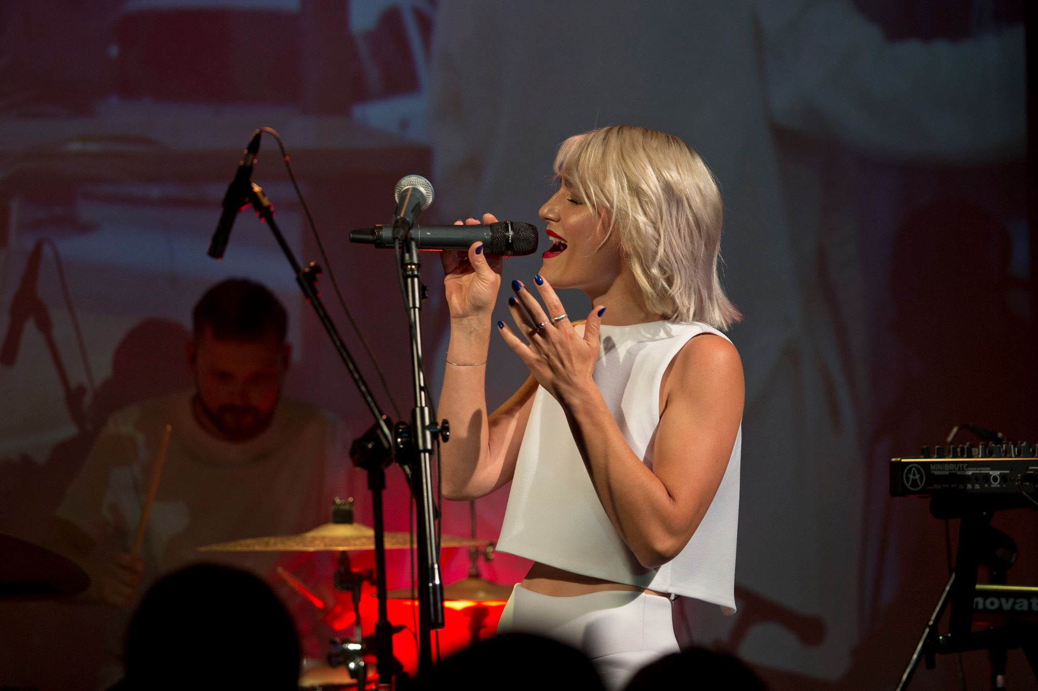 Marika podczas występu w Czwórce Polskiego Radia na gali finałowej plebiscytu „Nieprzeciętni”.